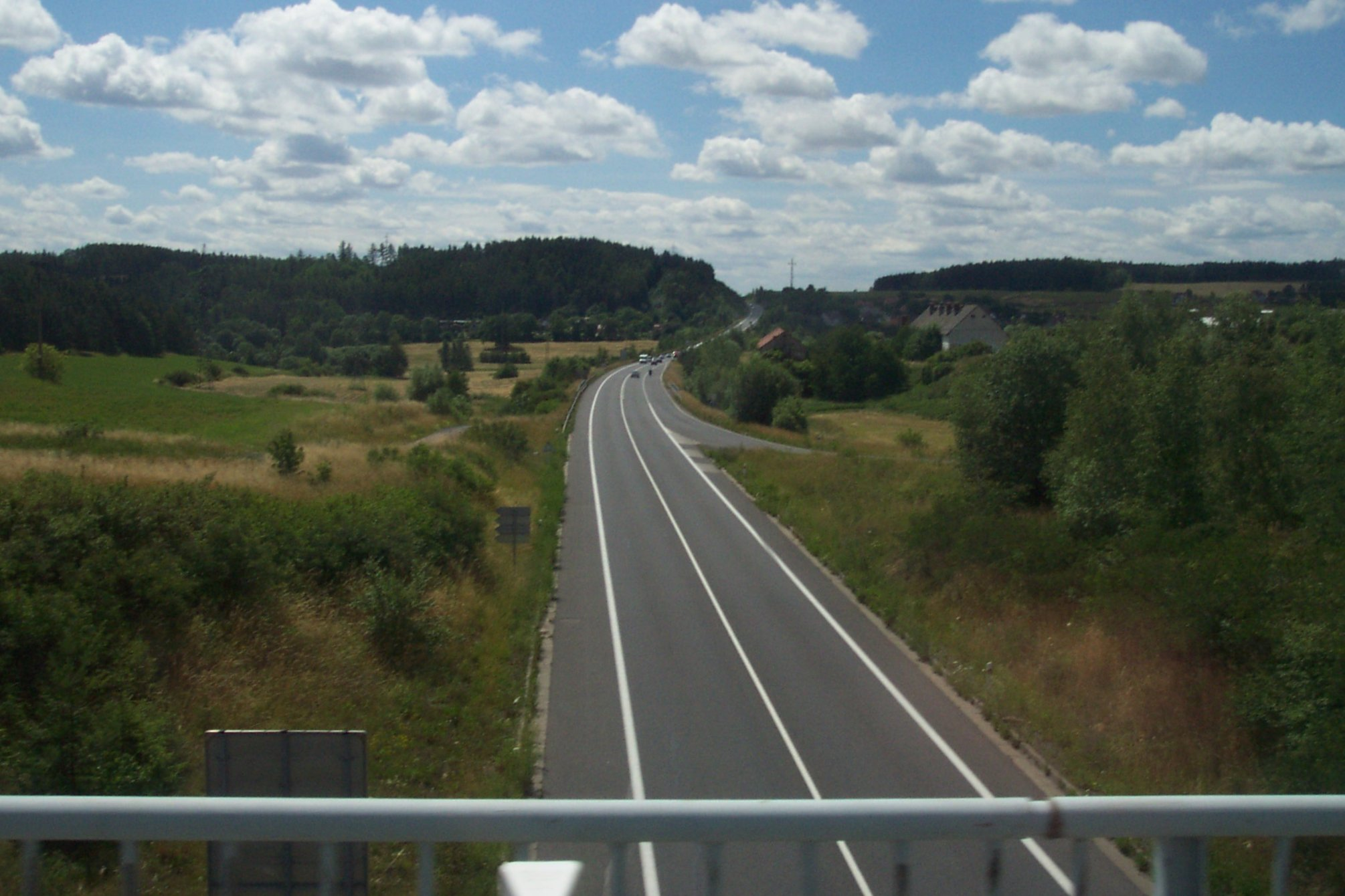 Road no. 4 in Czech Republic, near Milín, okres Příbram - Silnice č. 4 u Milína v okresu Příbram.